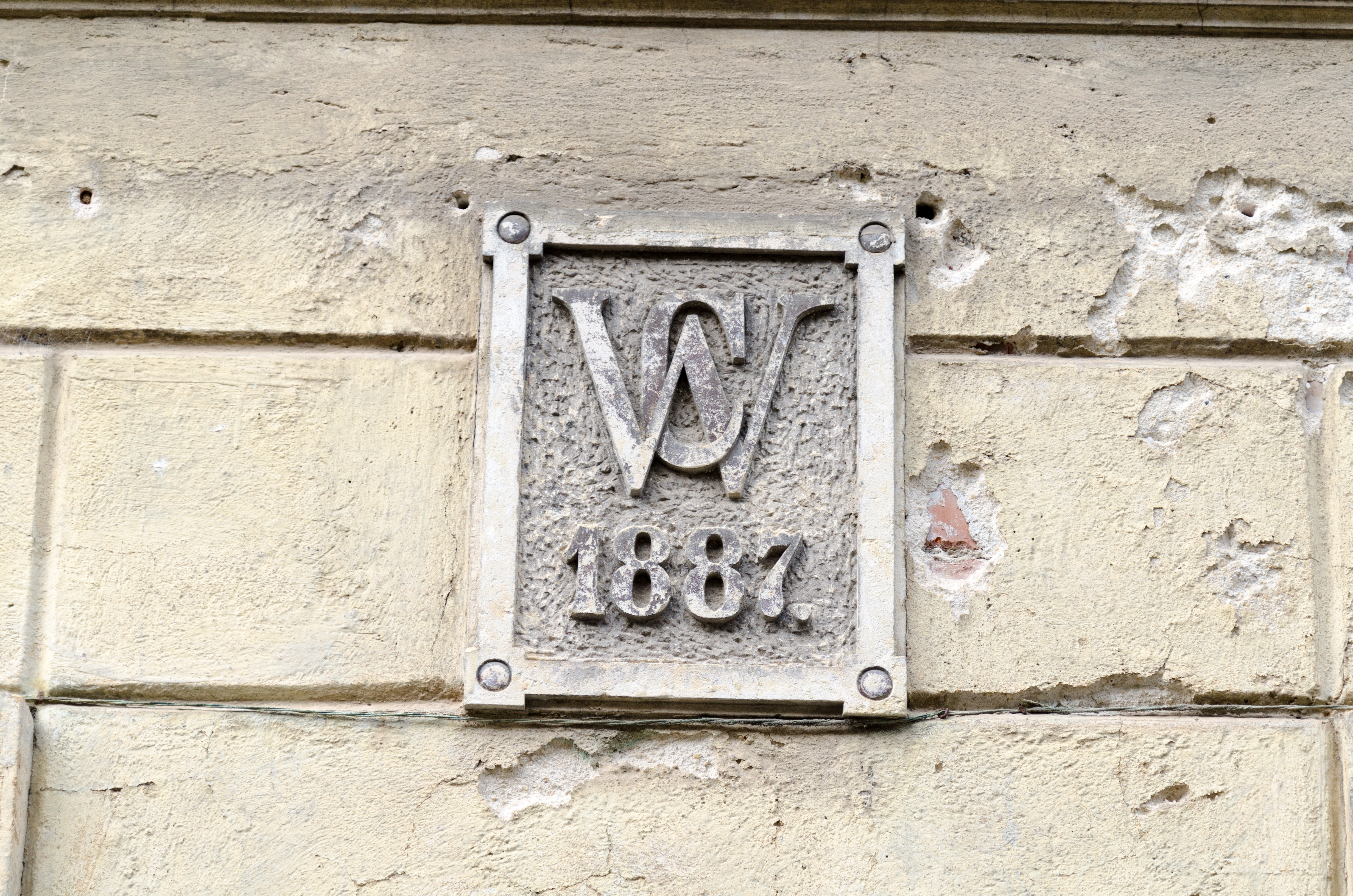 Zeitz, Steinsstraße 3